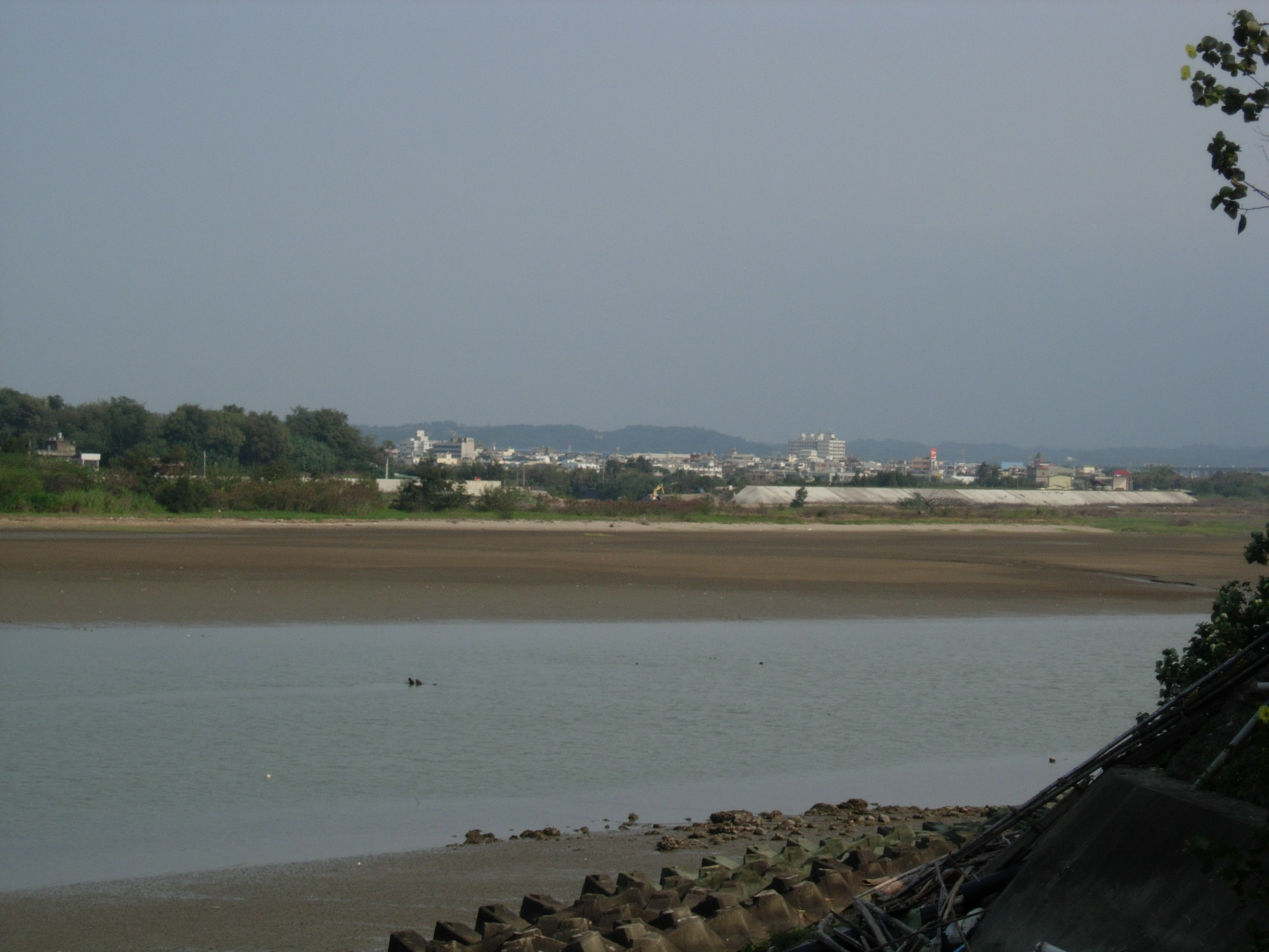 中文（台灣）: 遠望後龍市區